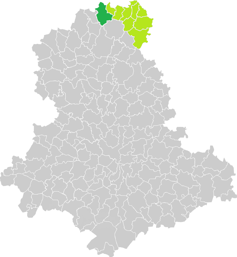 Carte de situation de la commune de Lussac-les-Églises (en vert foncé) dans le votre Canton (en vert clair) sur une carte des communes de la Haute-Vienne